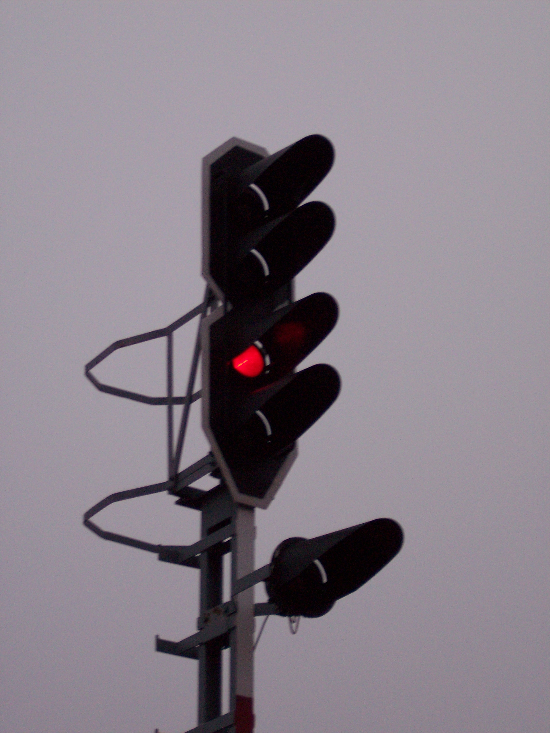 Railroad lamp (Hungary)